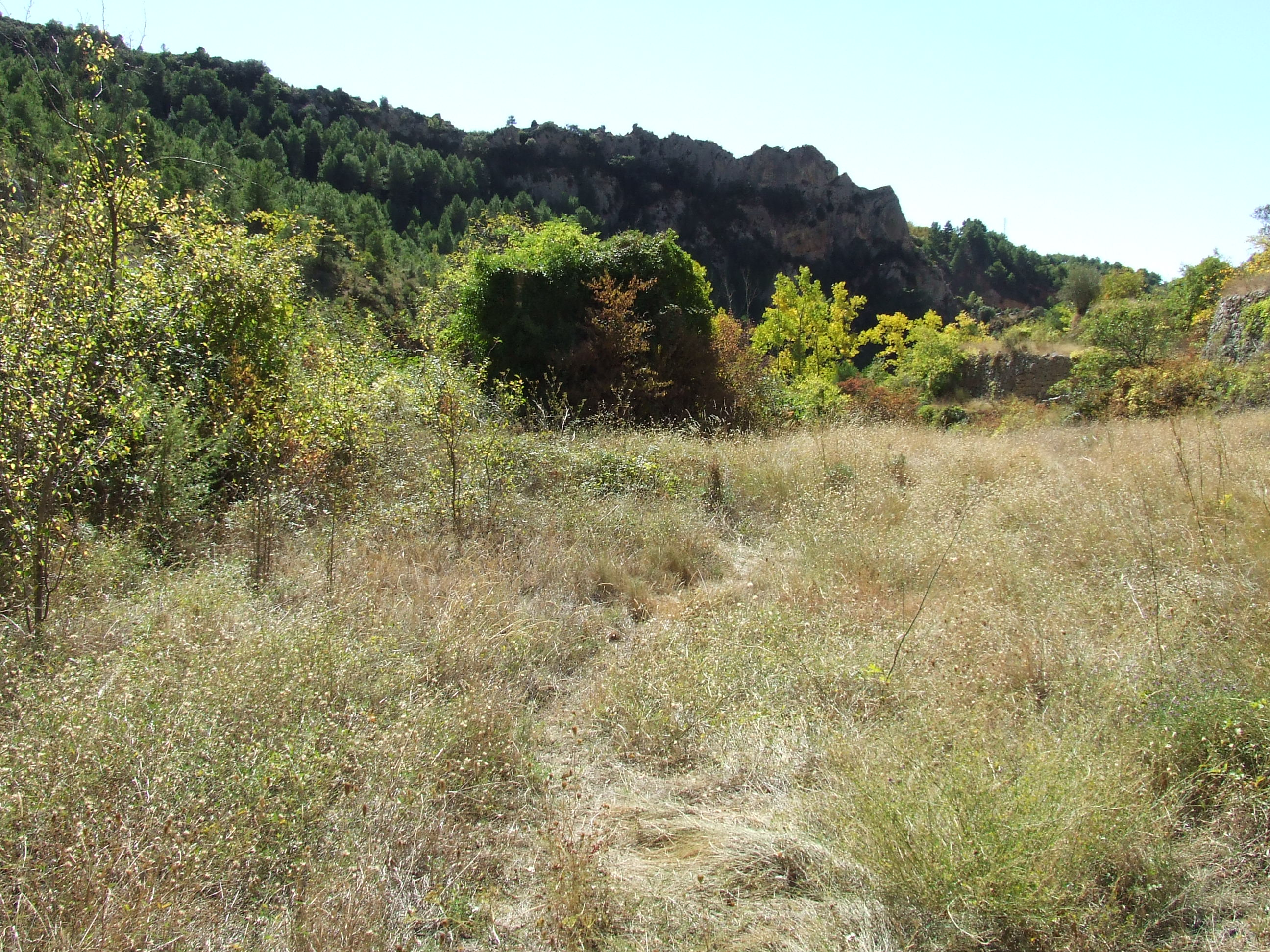 El Molí vell d'Abella (Abella de la Conca, Pallars Jussà)